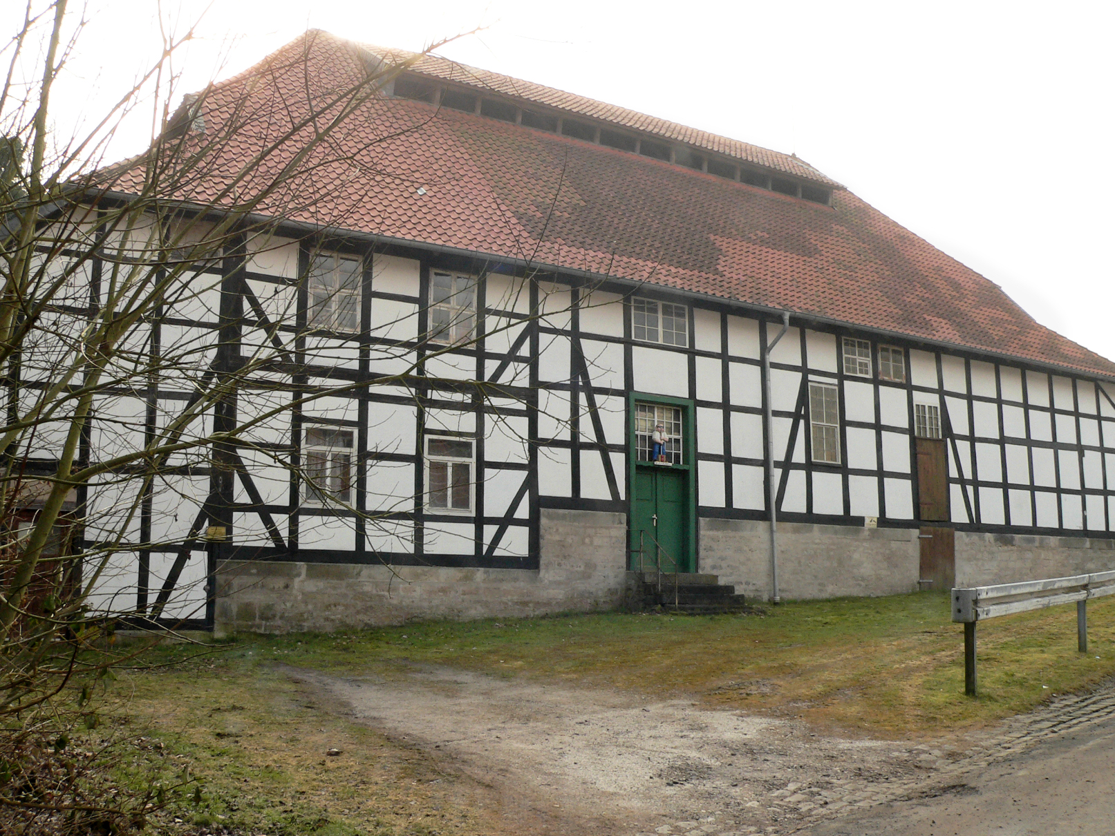 Stendersche Glasfabrik